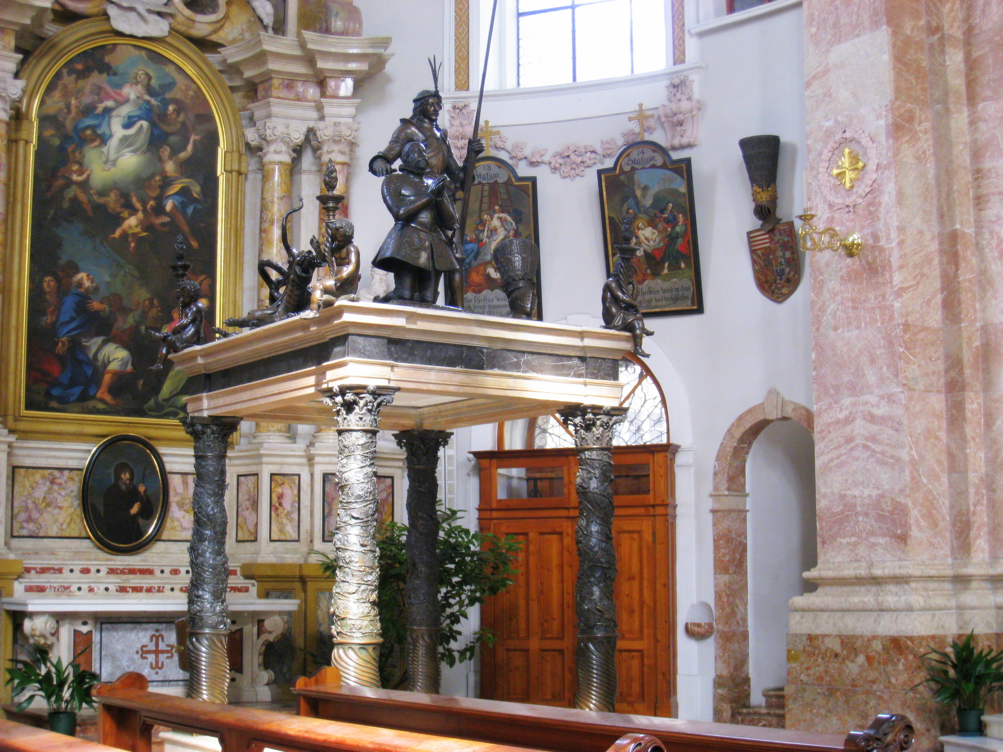 Dom zu St Jakob, Innsbruck, Austria.